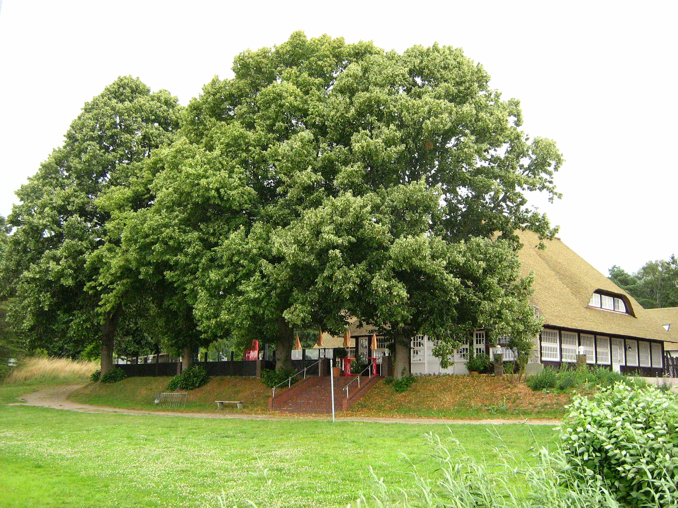 Der Wendenkrug, eine Restauration auf der Burgwallinsel im Teterower See (Landkreis Güstrow, Mecklenburg).